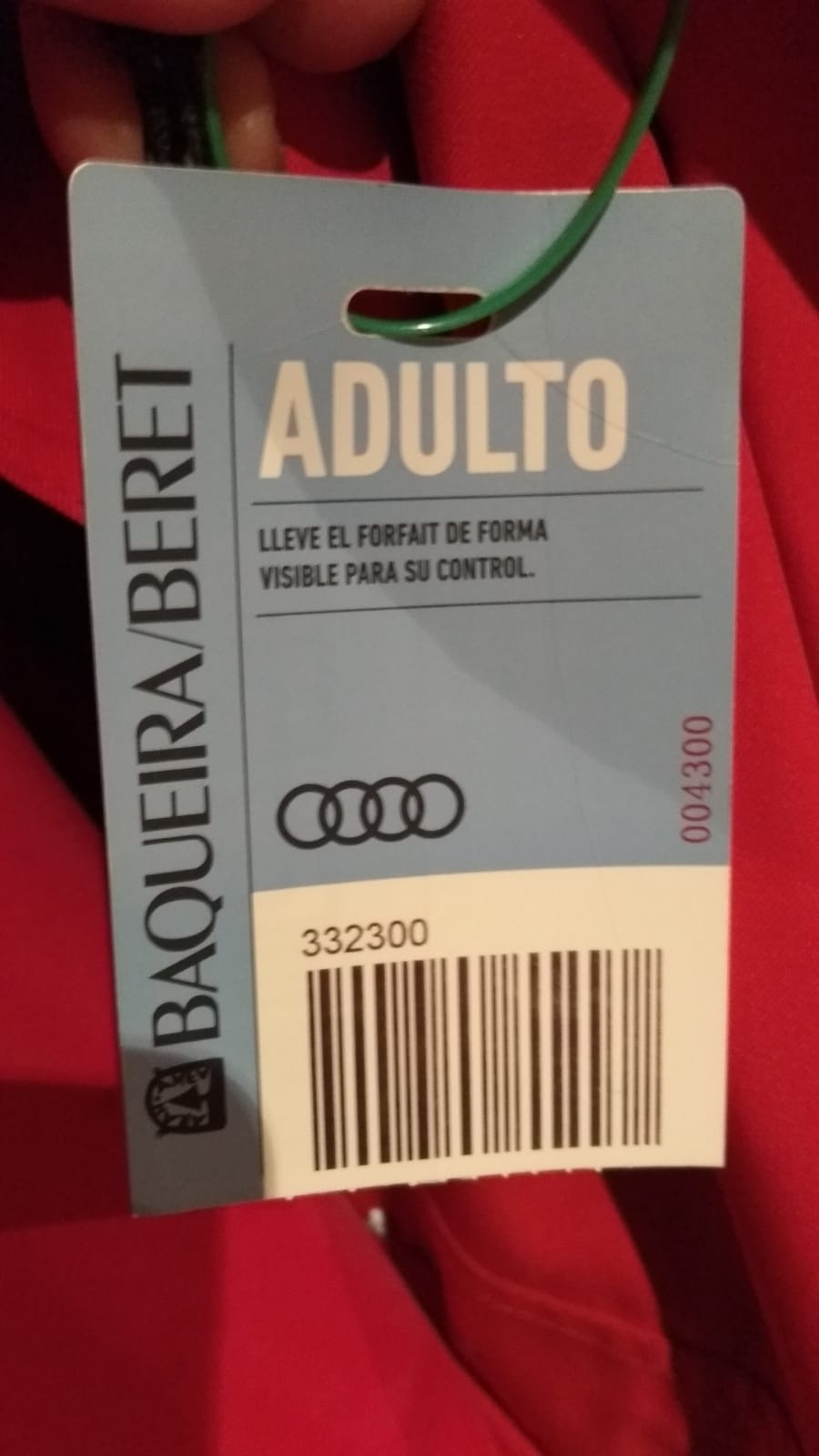 Forfet visible de codi de barres Baqueira Beret, temporada 2017/2018